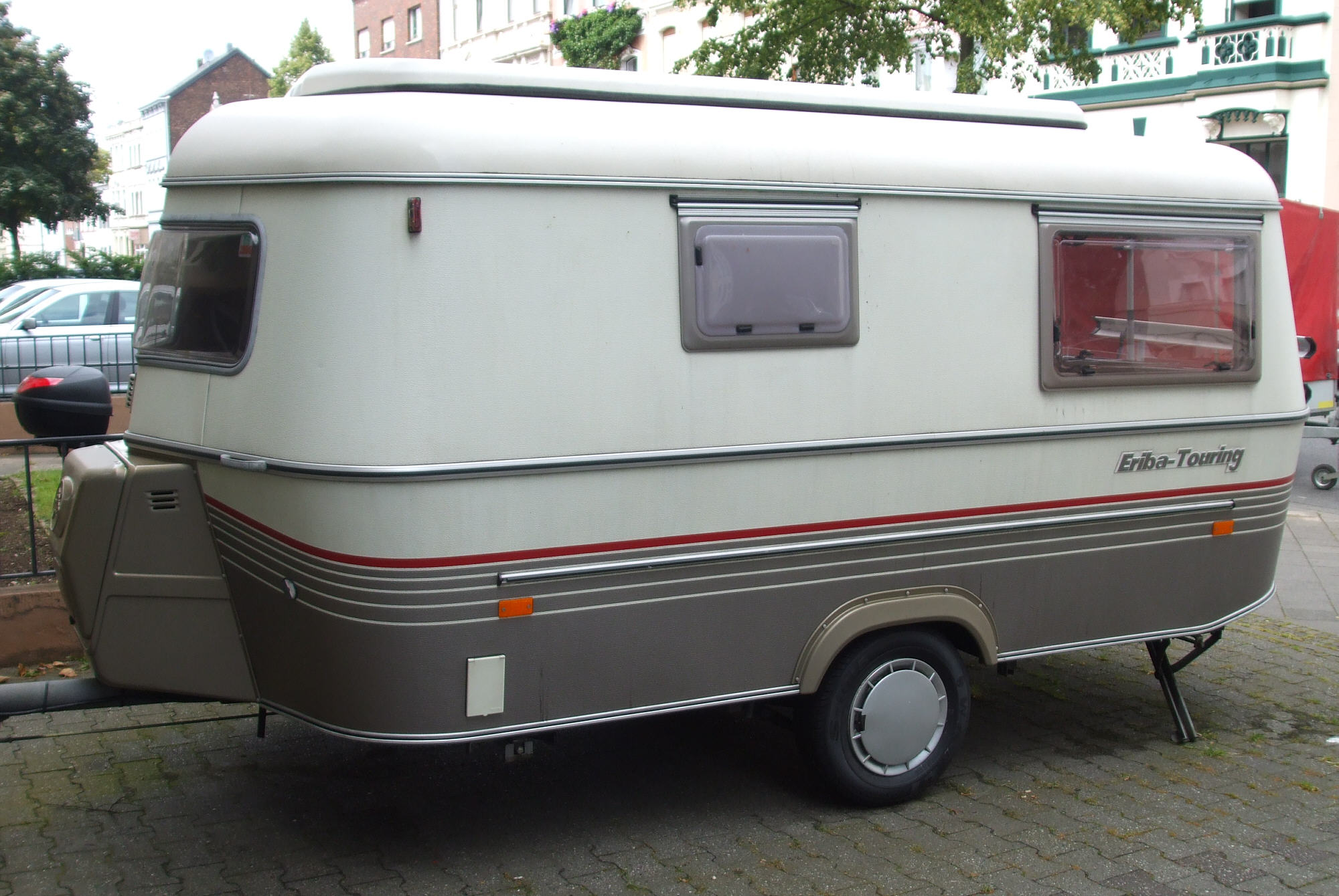 Eriba Wohnwagen „Touring“